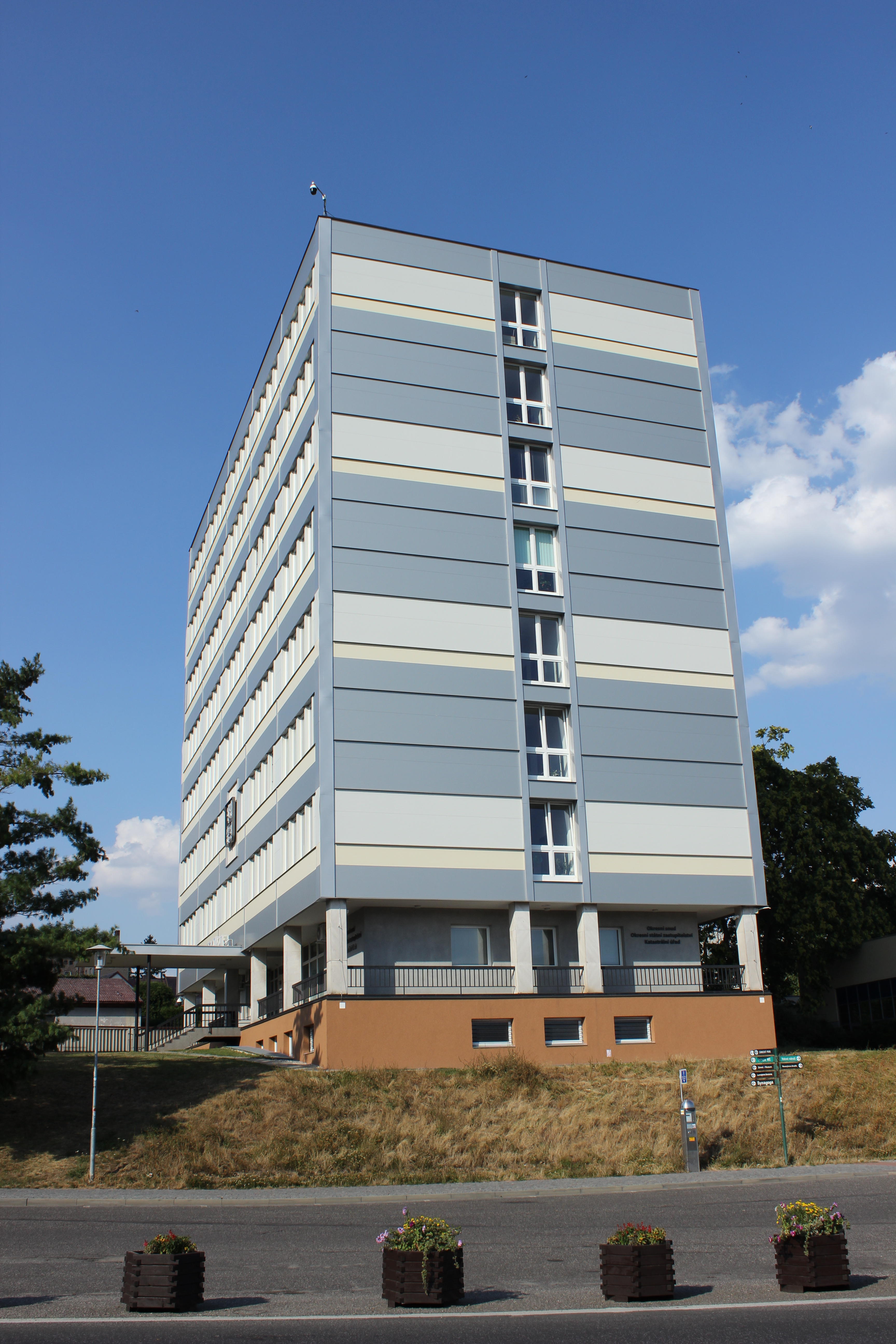 Budova okresního soudu, okresního státního zastupitelství a katastrálního úřadu v Jičíně.